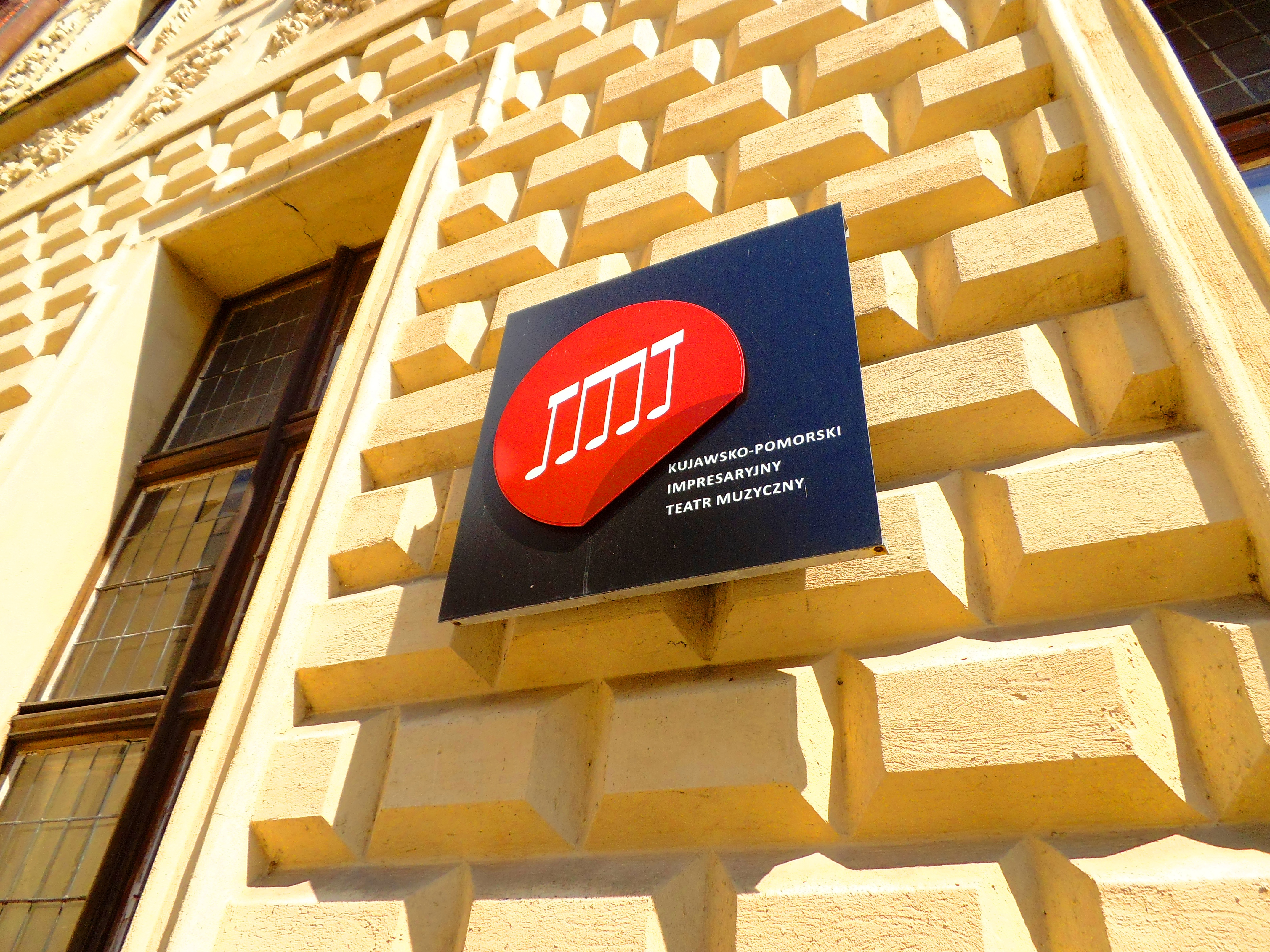 Logo Teatru Muzycznego w Toruniu